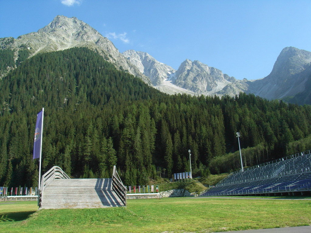 Das Antholzer Tal ist sehr beliebt bei Langläufern und Biathleten. Im Biathlonzentrum Antholz im Antholzer Tal kann man das richtige Laufen und Schießen erlernen. Auch Profis trainieren auf den Loipen rund um den Antholzer See. powered by La Valle di Anterselva è molto preferito dai fondisti. Al Centro Biathlon Anterselva nella Valle di Anterselva si può imparare ad andare a sci di fondo e tirare. Anche i professionisti si allenano qui intorno al lago di Anterselva. powered by